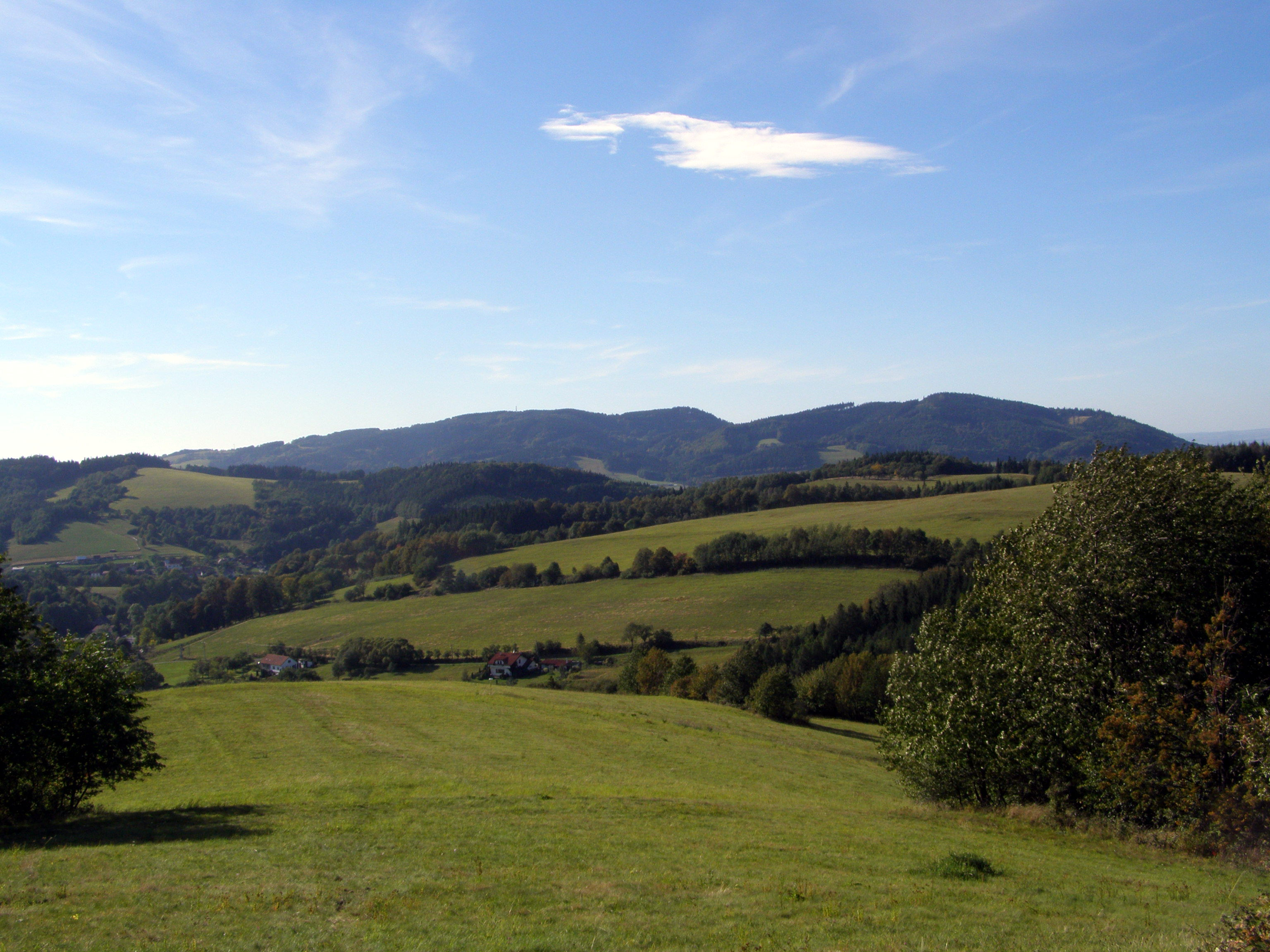 Pohled z Metylovské hůrky, Metylovická pahorkatina (severovýchod), v pozadí Palkovické hůrky